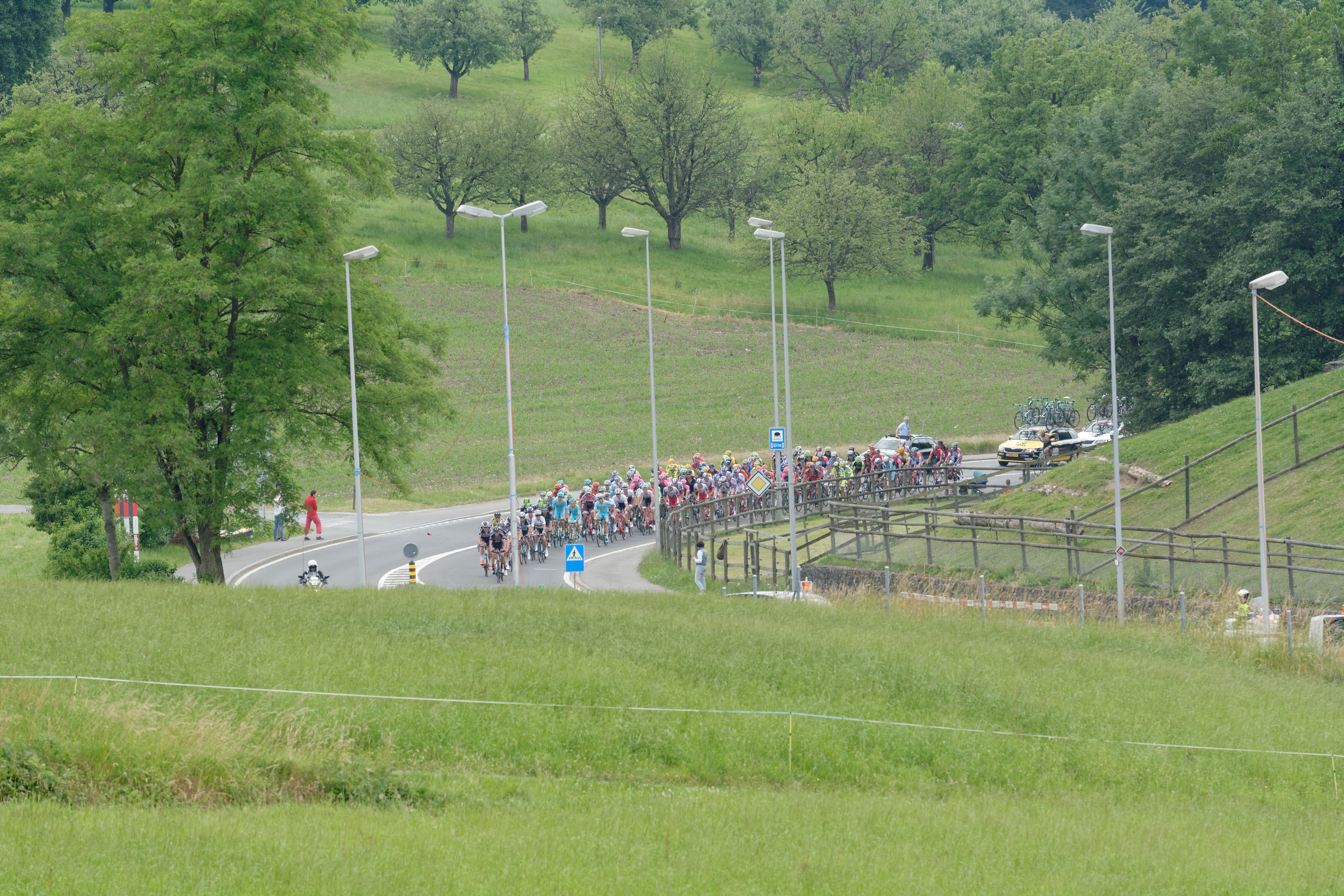 D71_0145_DxO